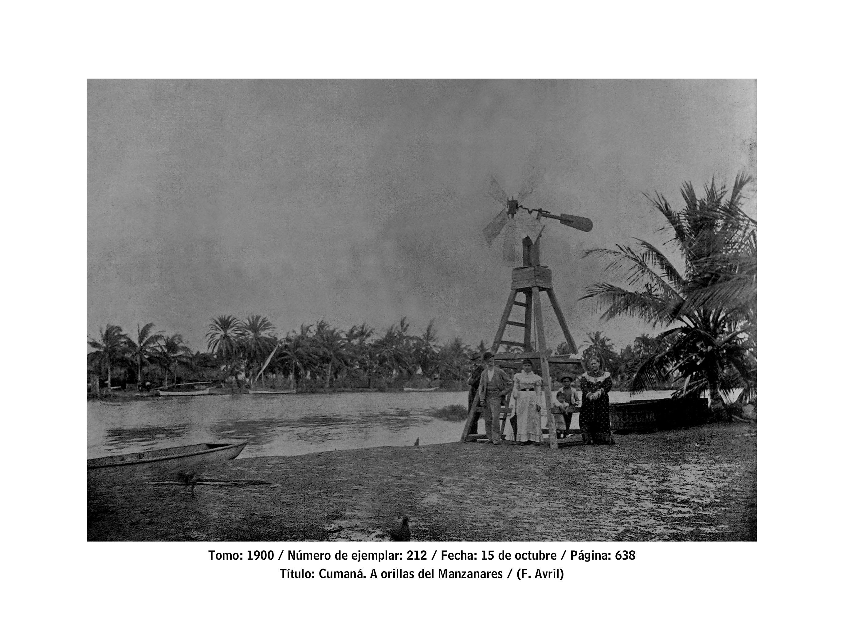 Cumaná, a orillas del Manzanares